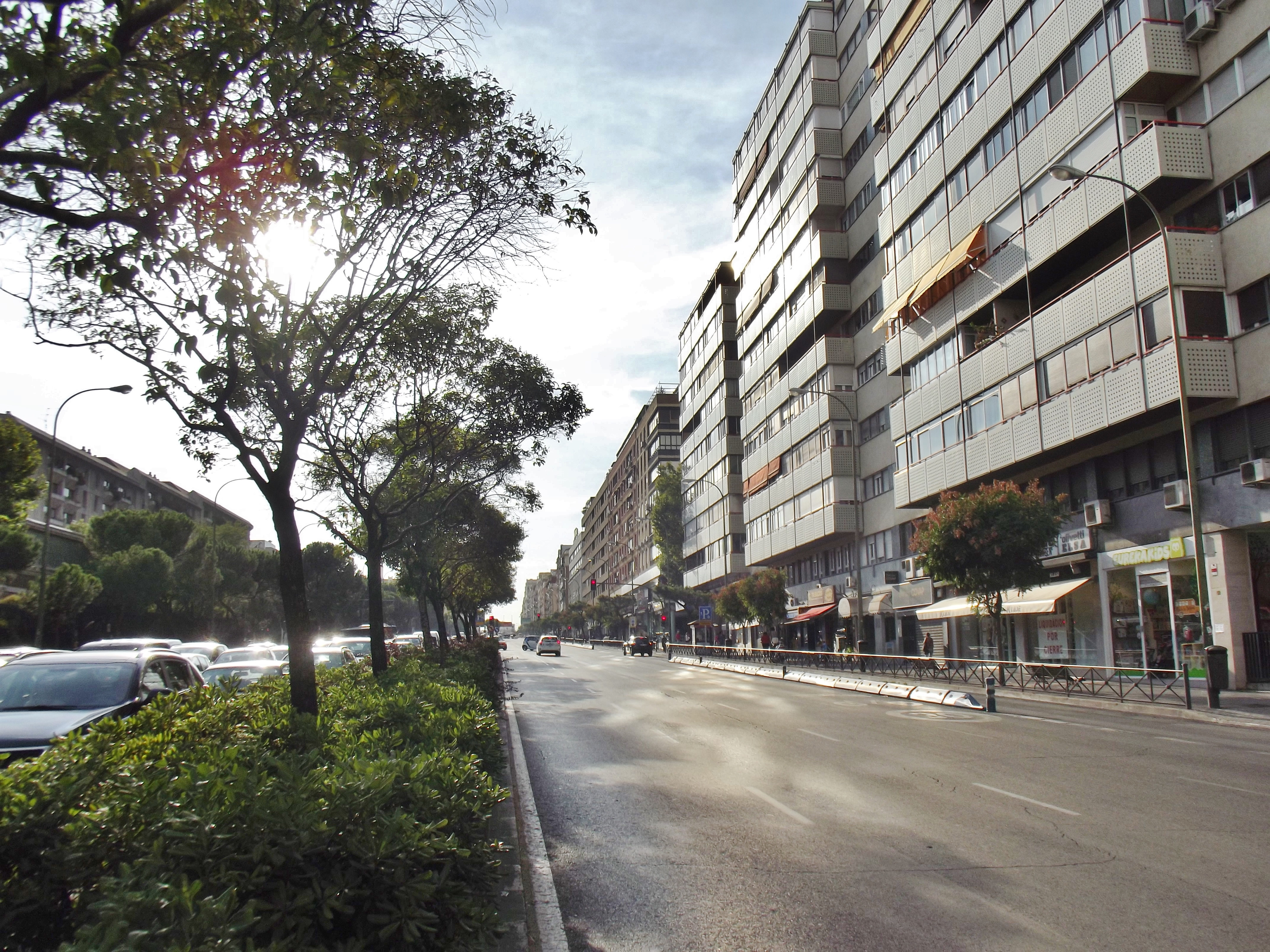 Calle de Raimundo Fernández Villaverde, Madrid.